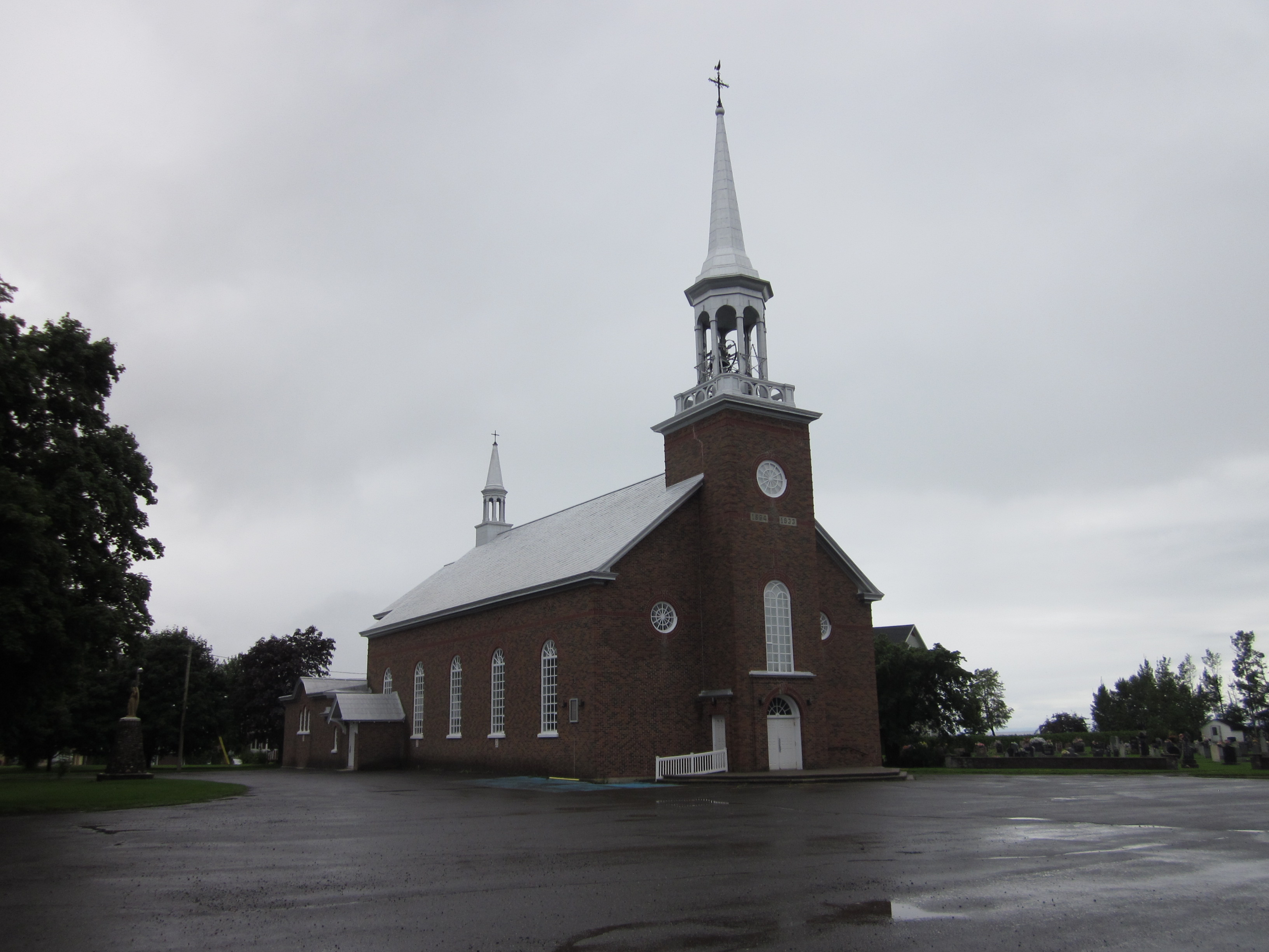 Église Notre-Dame-des-Saints-Anges de New Richmond est une église catholique construite entre 1865 et 1870. Elle est situé dans le site du patrimoine de New Richmond.